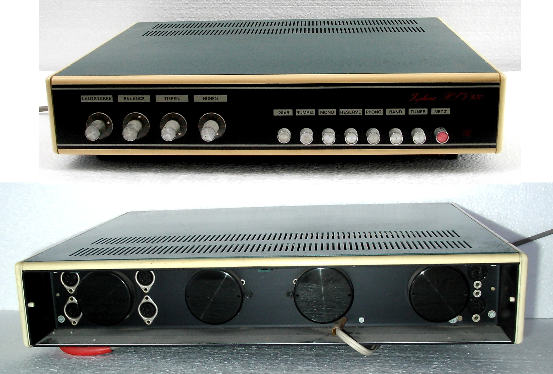 Heimstereoverstärker der Marke Ziphona HSV 920, Vorderansicht und Rückansicht.